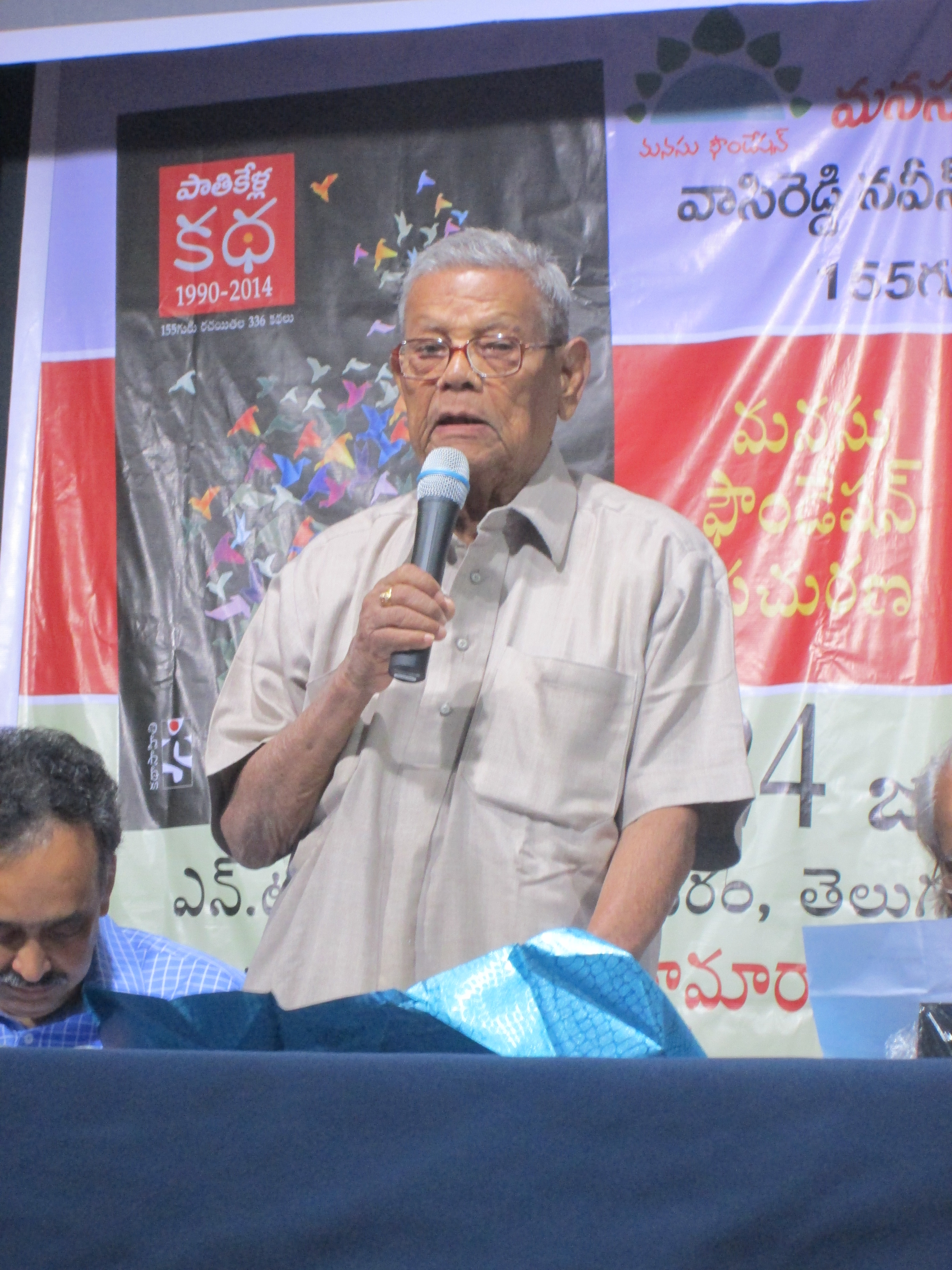 కాళీపట్నం రామారావు